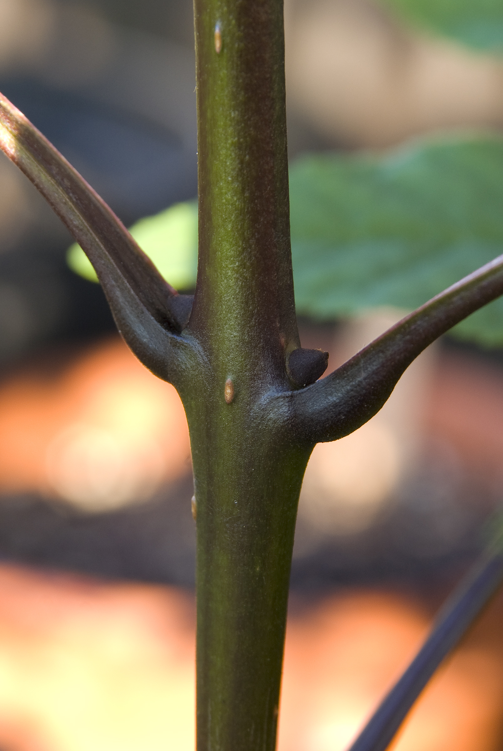 Wachsener Stamm eine sehr jungen Esche. Zweigaustriebe in Nahansicht.